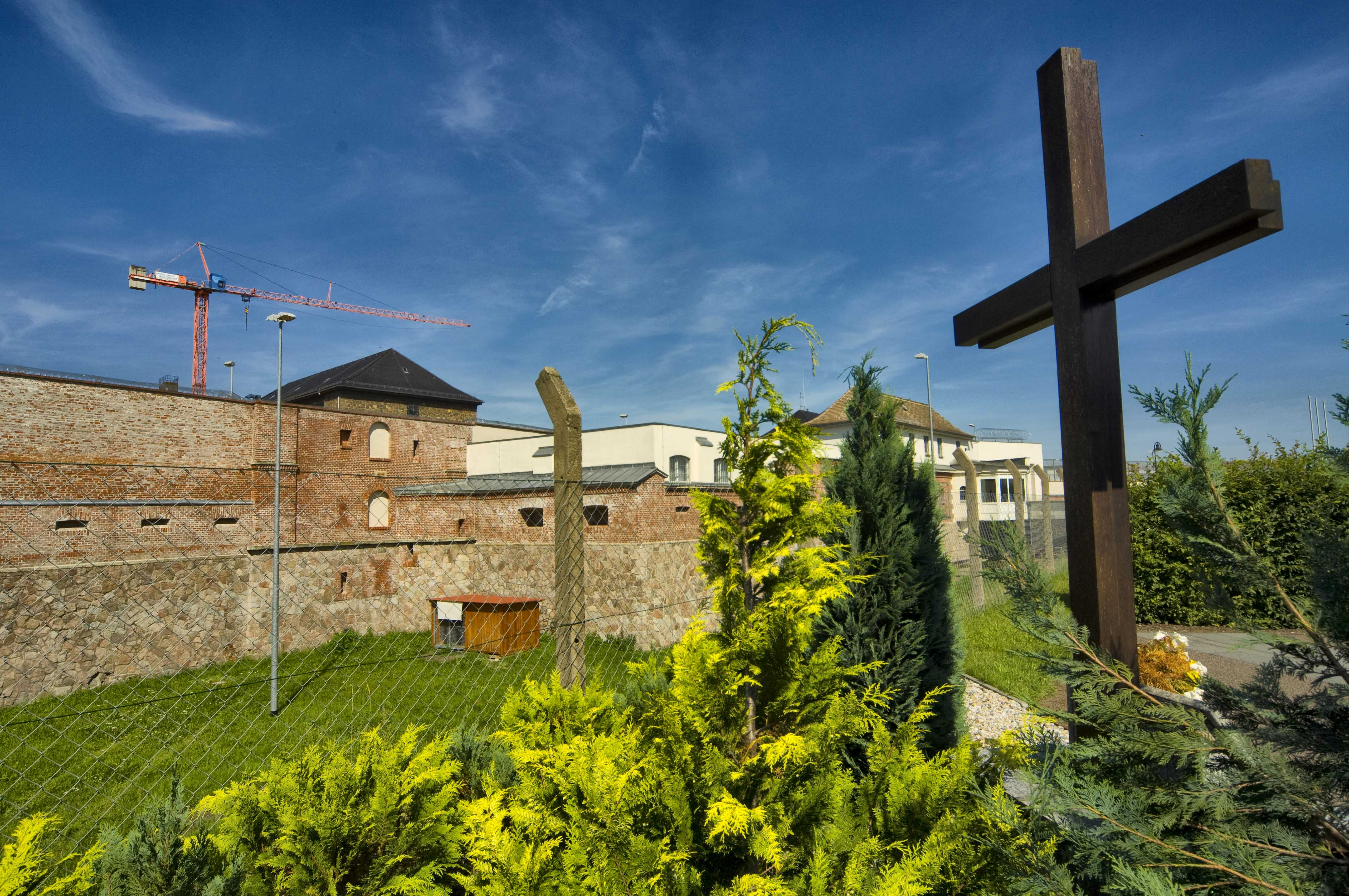 Fort Zinna Festung Torgau